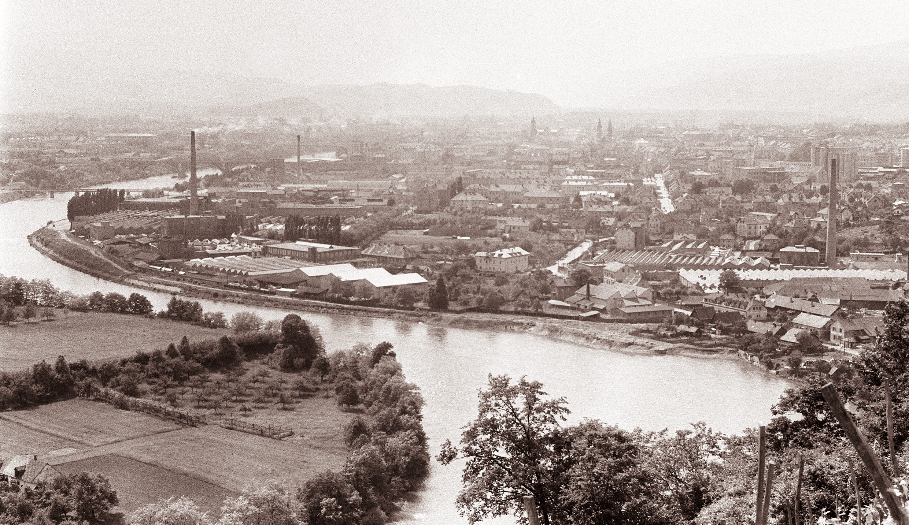 Panoramski posnetek Maribora - Melje